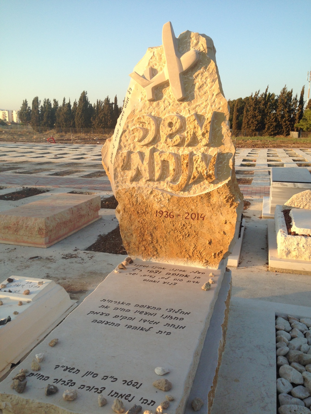 מצבתו של משה מנחמי